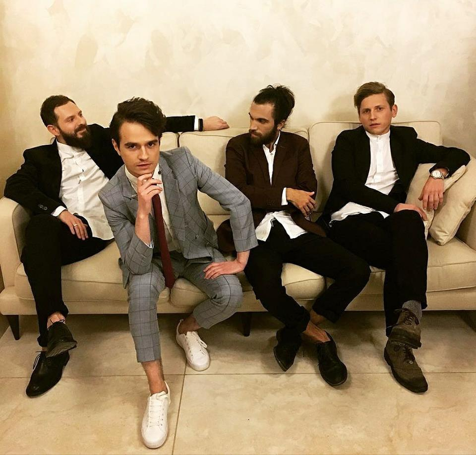 Склад Brunettes Shoot Blondes: (зліва направо) Євген Кобзарук, Андрій Ковальов, Дмитро Леонов, Роман Соболь.